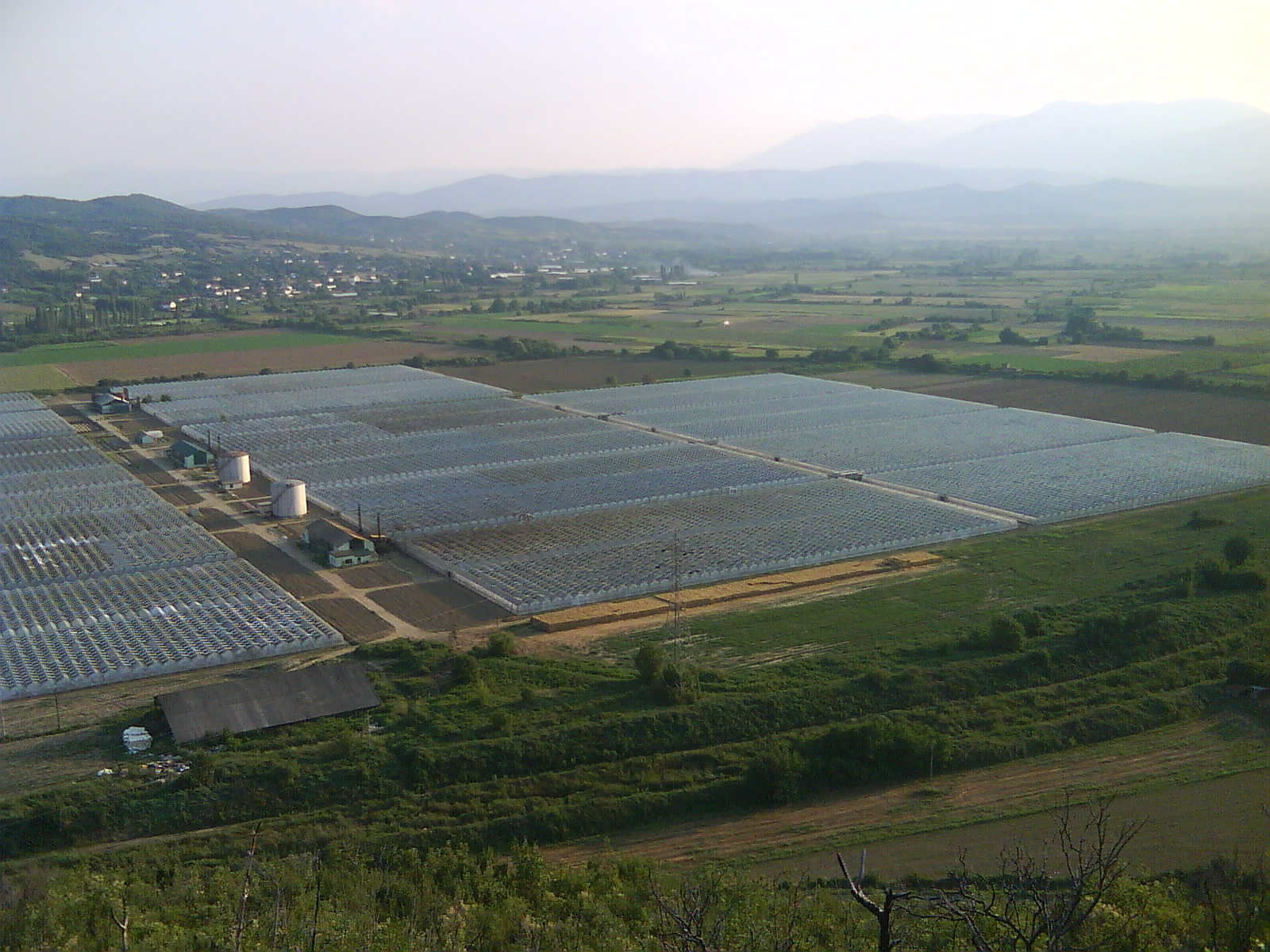 Oranzerii Anska reka, Valandovo